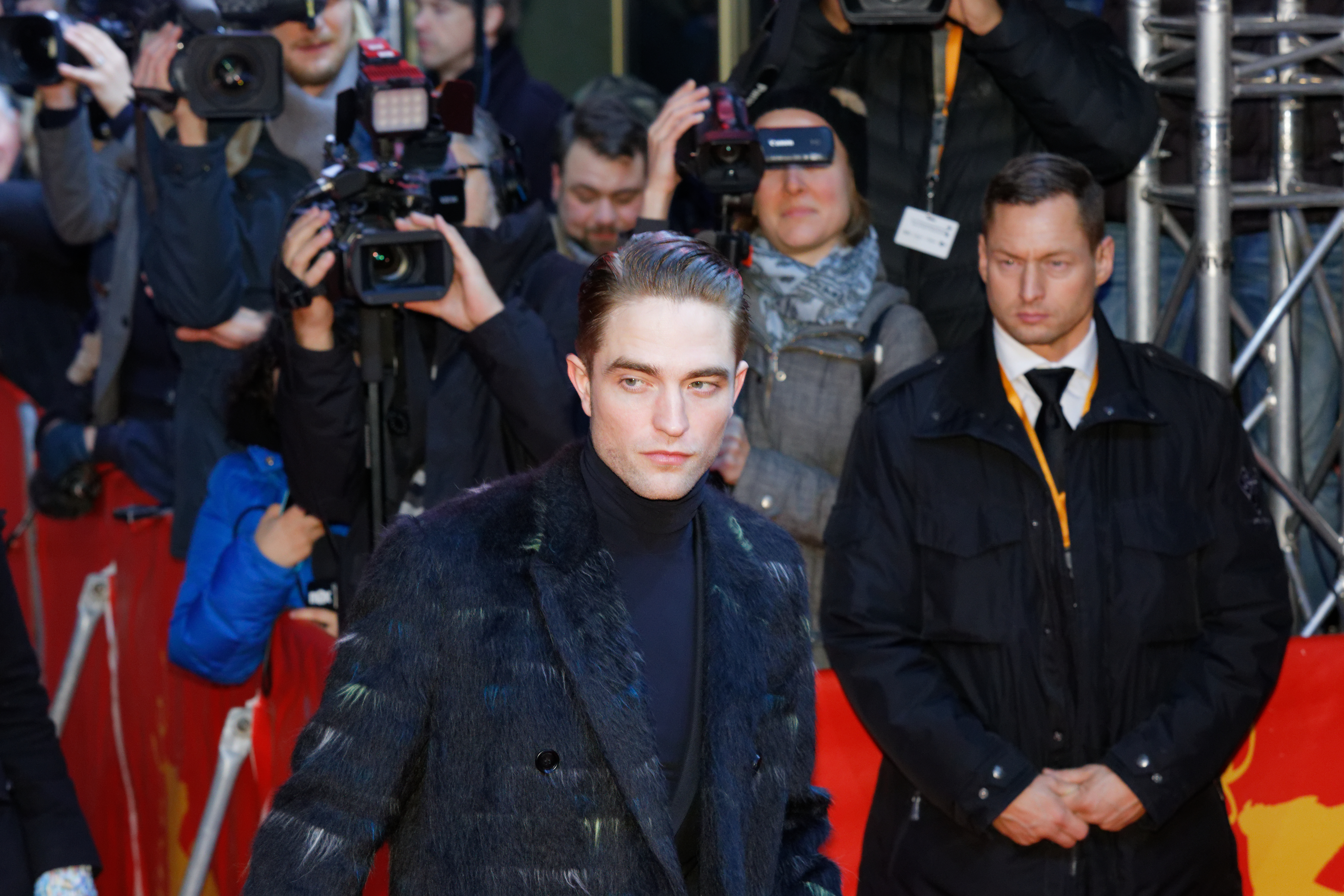 Robert Pattinson bei der Premiere von Die versunkene Stadt Z im Zoo Palast bei der Berlinale 2017